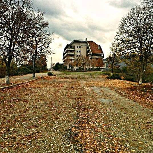 Turizmi i Ri i Kukesit ne stinen e vjeshtes